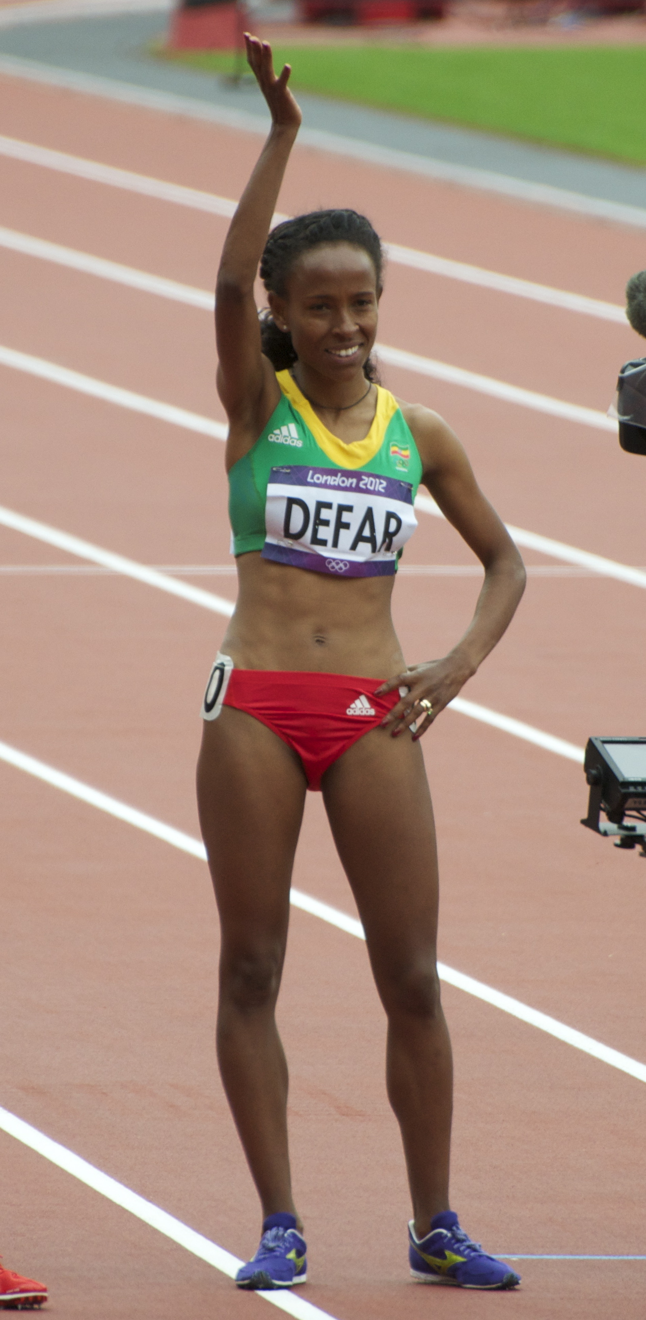 Women's 5000m